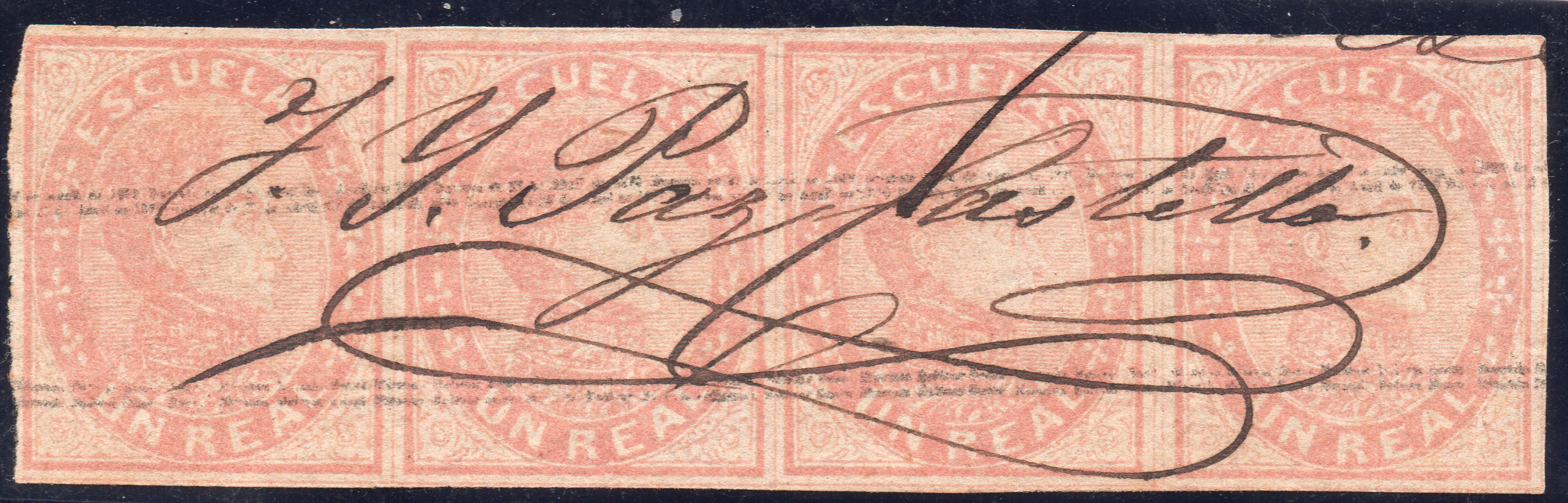 Tira de 4 de la Primera Serie ESCUELAS, segunda tirada, con la firma de José I. Paz Castillo, considerado el padre de la filatélia venezolana.